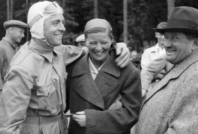 Bernd Rosemeyer, Elly Beinhorn, Ferdinand Porsche Rosemeyer fährt neuen Rekord Die Auto-Union hatte auf der Reichsautobahnstrecke bei Frankfurt/Main am Mittwoch Versuchsfahrten mit ihrem stromlinienverkleideten Avusrennwagen, mit dem Eifelsieger Bernd Rosemeyer am Steuer, durchgeführt, bei denen über den Kilometer eine Geschwindigkeit von 389,881 stdkm und über die Meile eine solche von 378,423 stdkm erreicht wurden. Der neue Rekordsieger strahlt über das ganze Gesicht, als ihm seine Gattin, Elli Beinhorn-Rosemeyer, und der Konstrukteur der Auto-Union-Rennwagen, Dr. Porsche, zu seinem Siege beglückwünschen. 16.6.1937 [Herausgabedatum] [Bei Frankfurt am Main.- Rennfahrer Bernd Rosemeyer, Fliegerin Elly Beinhorn, Ferdinand Porsche] Abgebildete Personen: Rosemeyer, Bernd: Automobilrennfahrer, verheiratet mit Elli Beinhorn, Deutschland (GND 118749722) Beinhorn, Elly: Sportfliegerin, Schriftstellerin, Deutschland (GND 118508490) Porsche, Ferdinand Prof. Dr. Ing.: Konstrukteur des Volkswagens, Deutschland (GND 118595881)